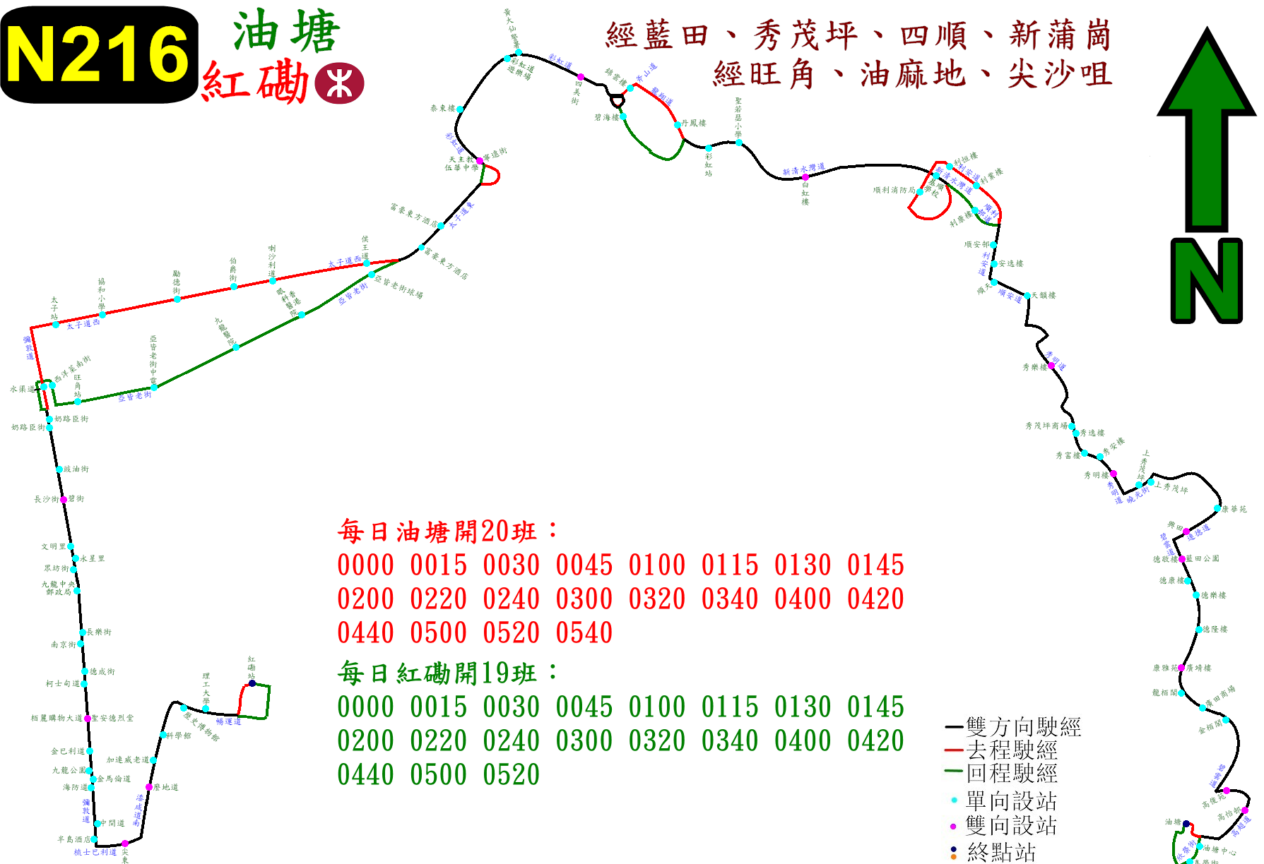 中文（香港）: 九巴N216線的走線圖